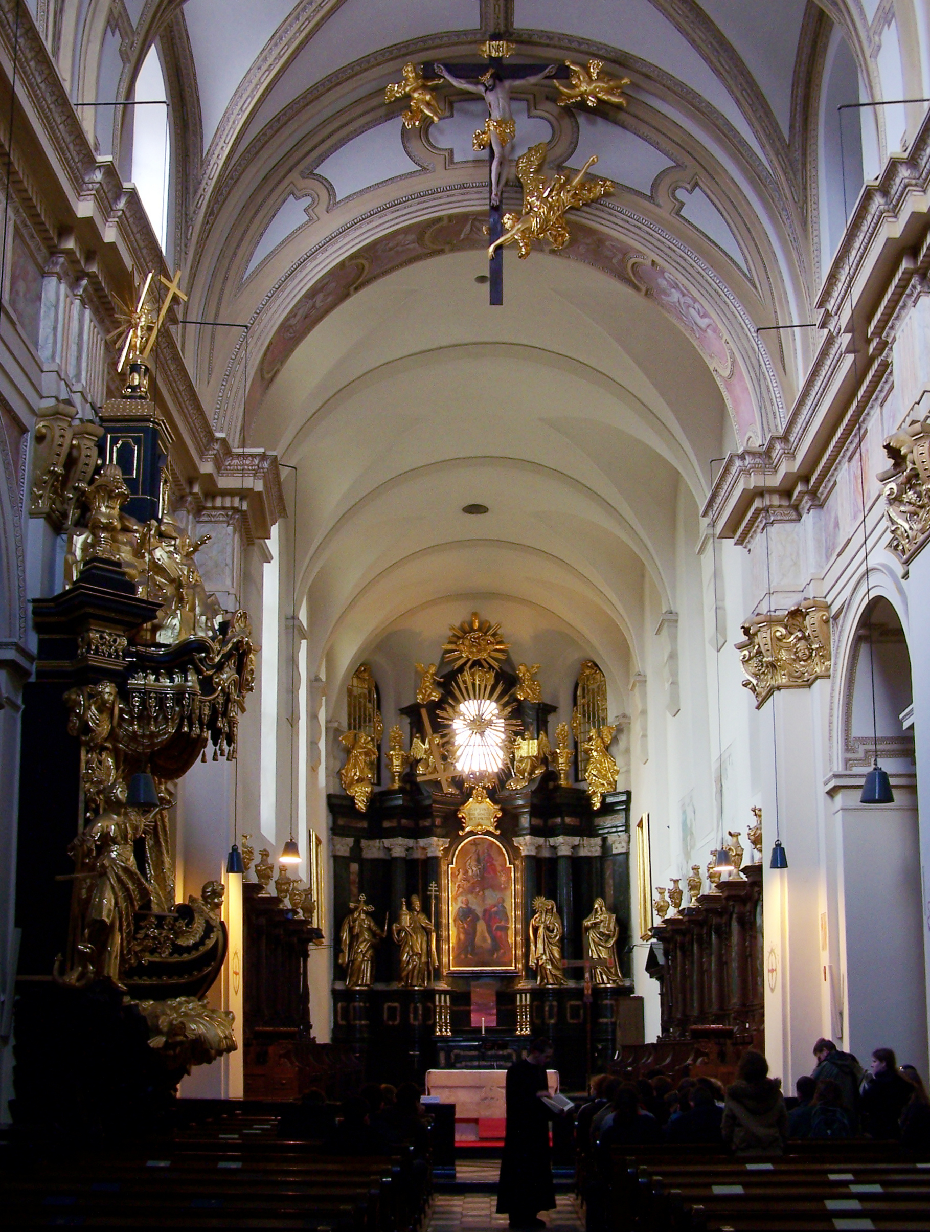 Widok przez nawę główną kościoła przyklasztornym w Tyńcu.